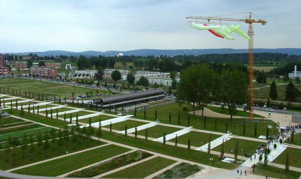 Foto vom Scharnhauser Park bei der Landesgartenschau Ostfildern 2002